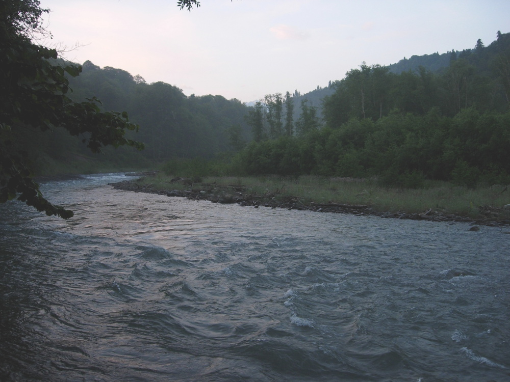 Река Киша выше кордона Киша